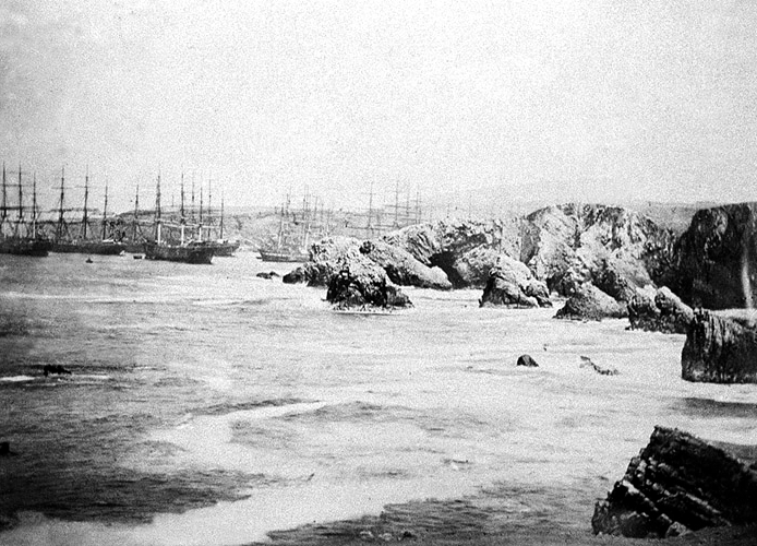 Carguío del guano en las islas Chincha. Costas de Perú, hacia 1866.